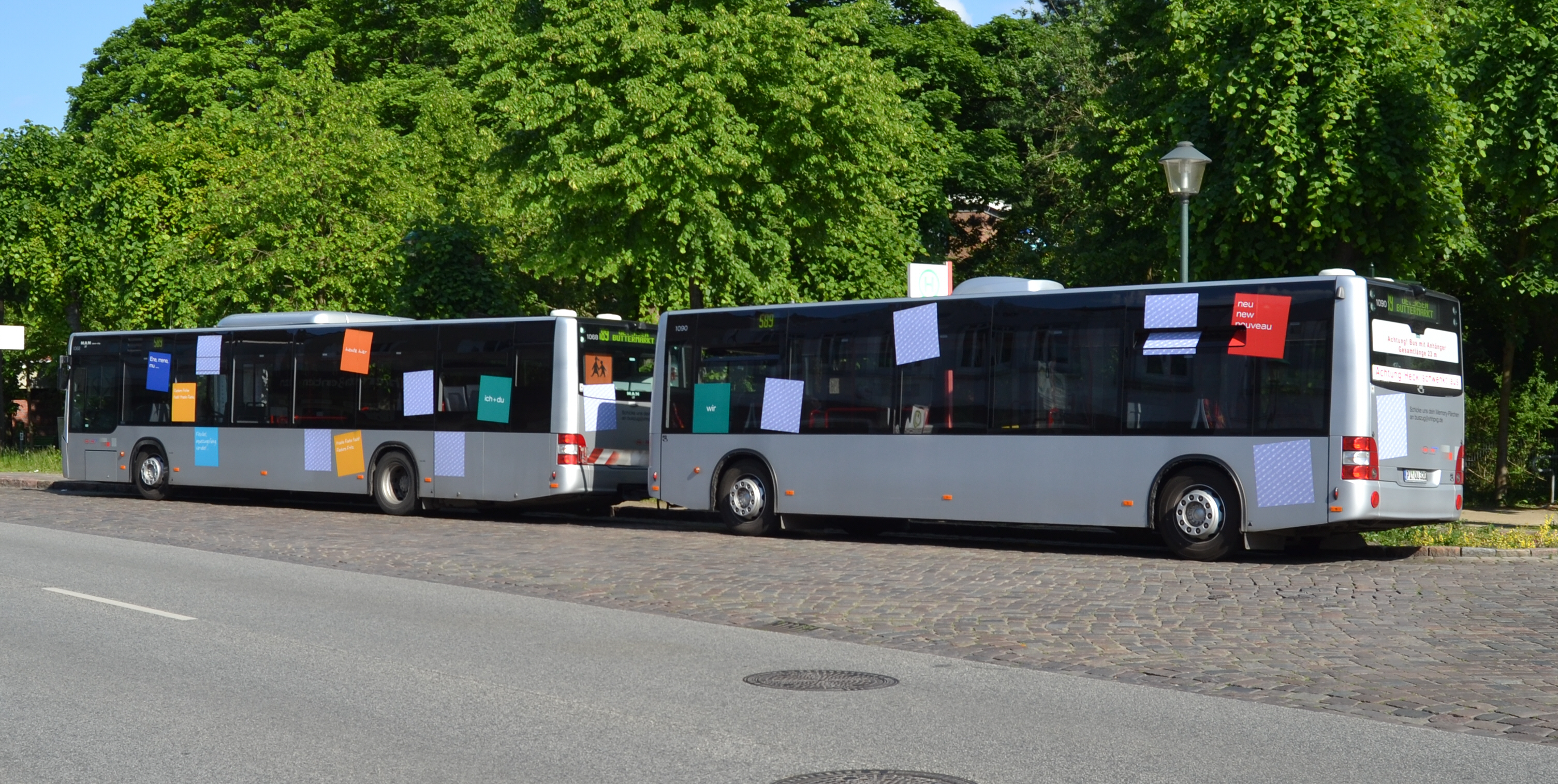 MAN Lion’s City A21 mit Göppel Maxi-Train Gesamtlänge 23 Meter am Buttermarkt in Uetersen